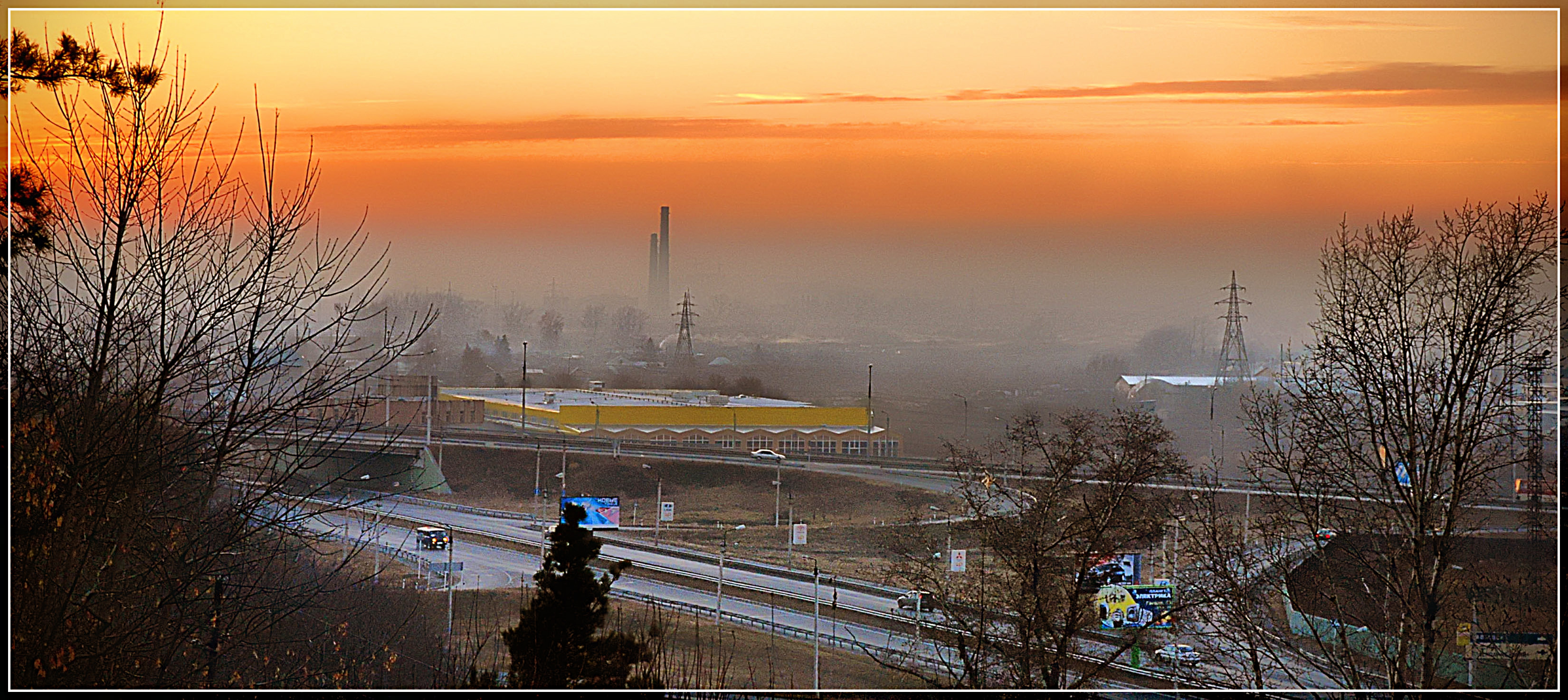 Барнаул. Вечер. Barnaul. Evening.